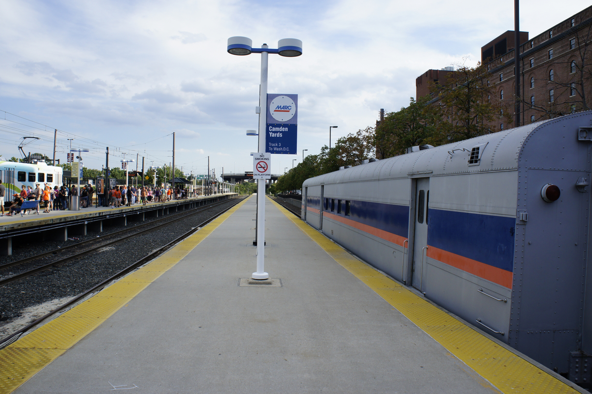 馬里蘭區域通勤鐵路坎登車站